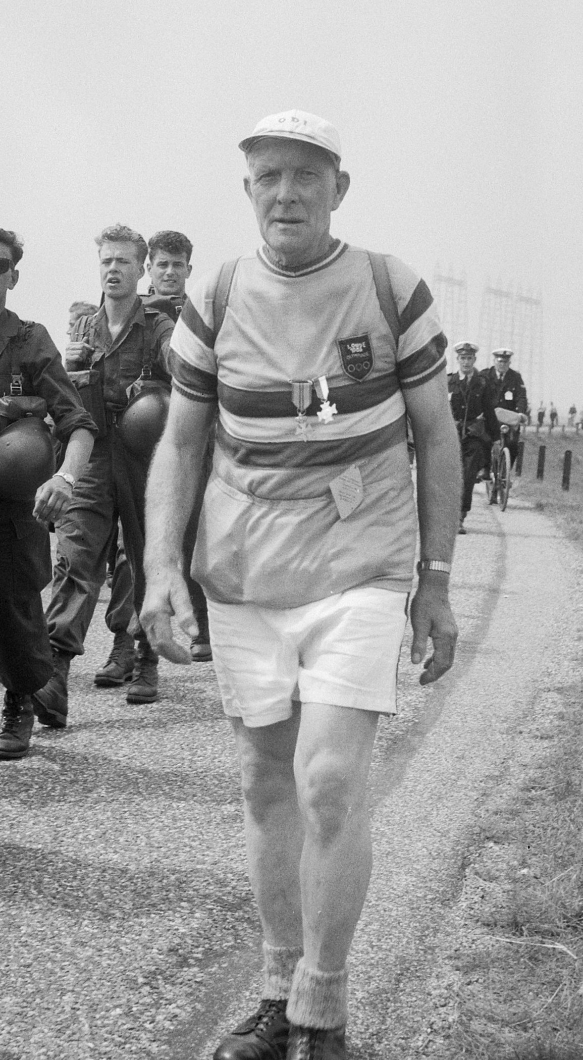 Van der Wal (geb. 1886) nam deel aan de Olympische Spelen in Londen van 1908.